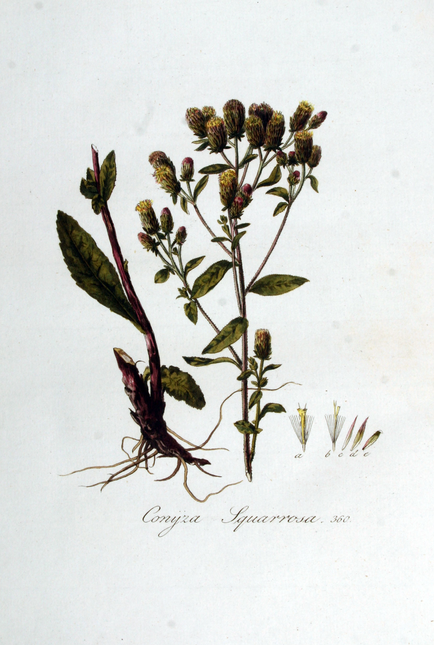 Inula conyzae (Griesselich) Meikle (Syn. Conyza squarrosa L., Inula conyza DC.)